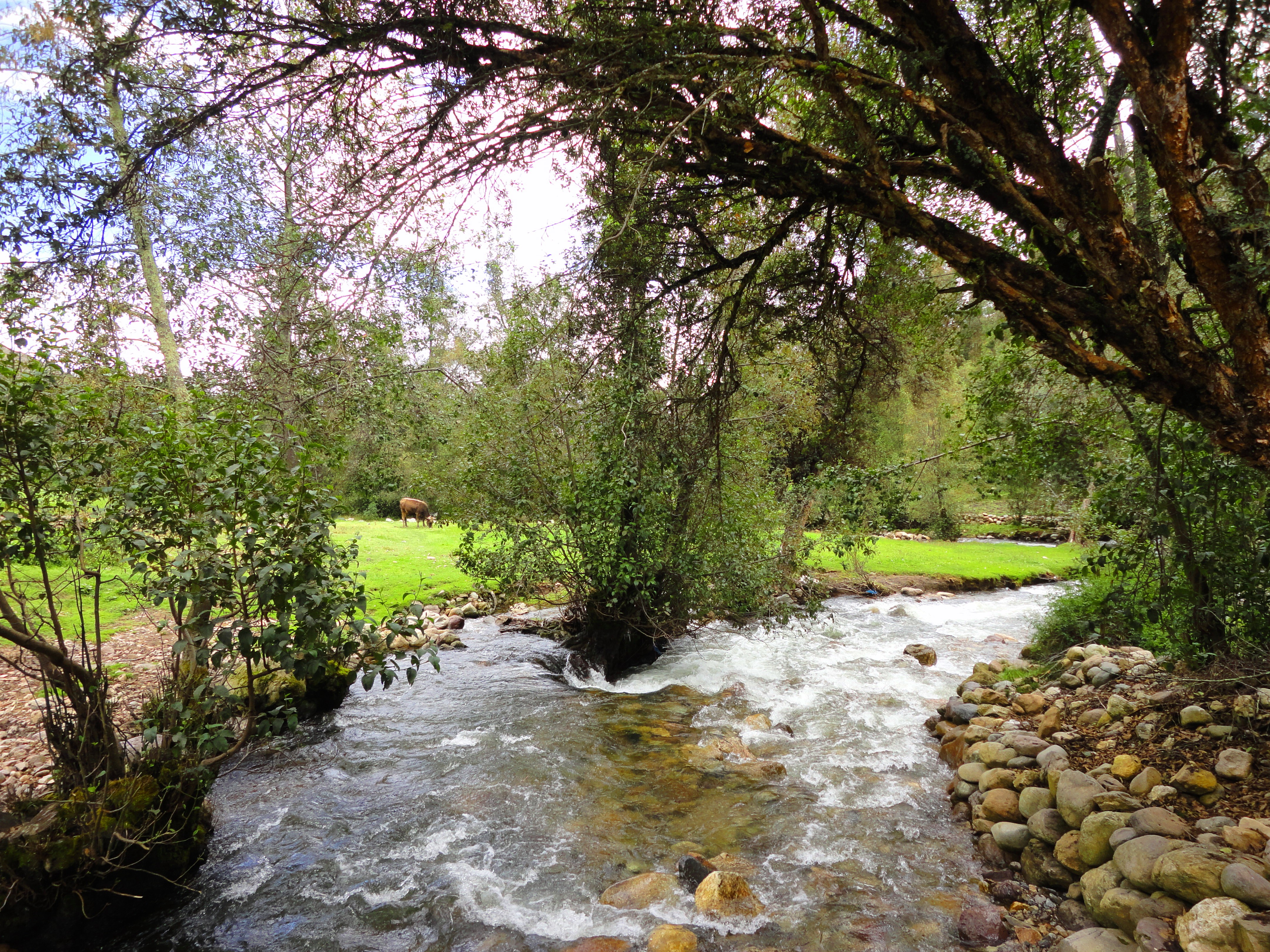 rios masminos